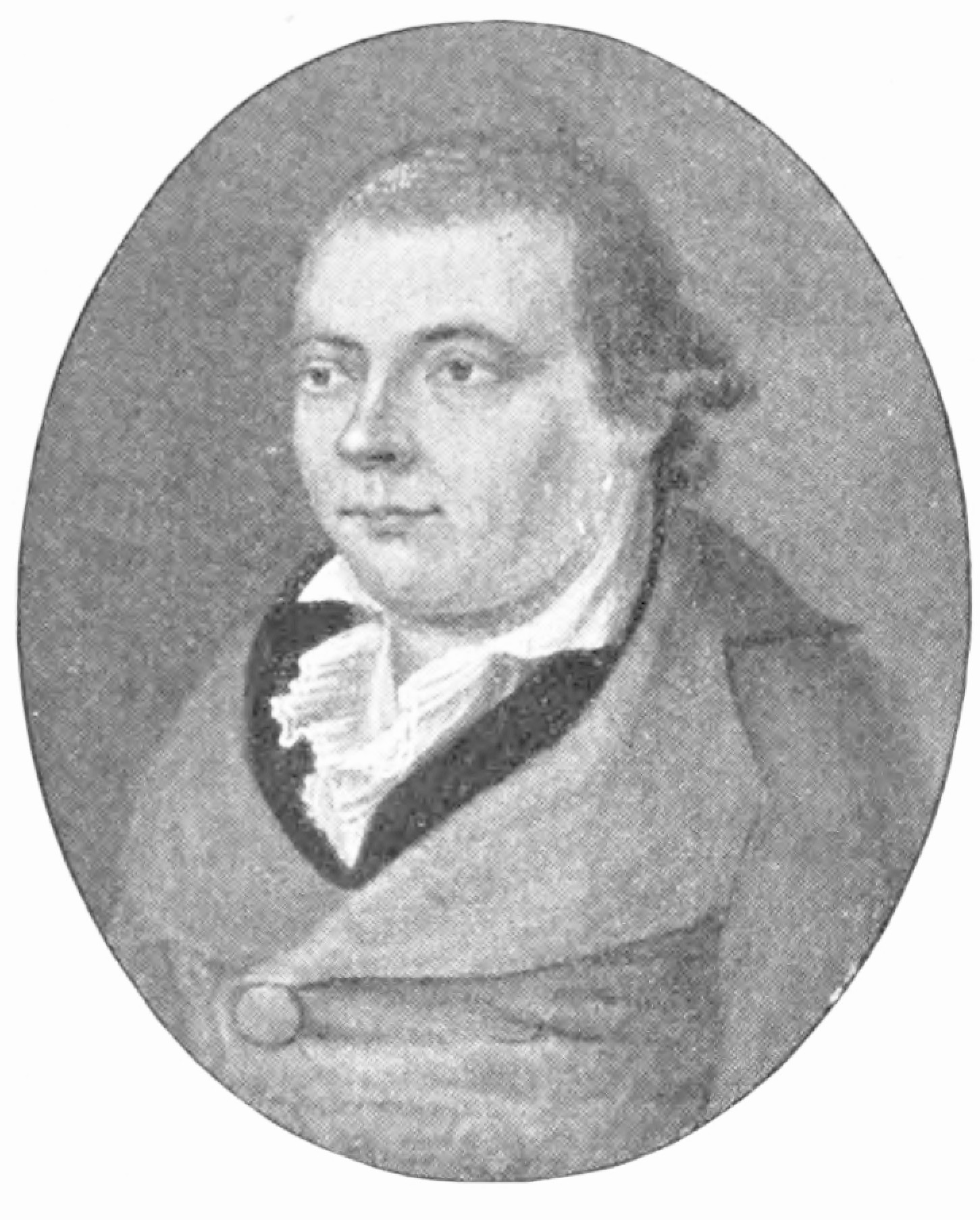 Karl Philipp Conz. In: Julius von Hartmann: Schillers Jugendfreunde. Stuttgart und Berlin: Cotta. S. 31